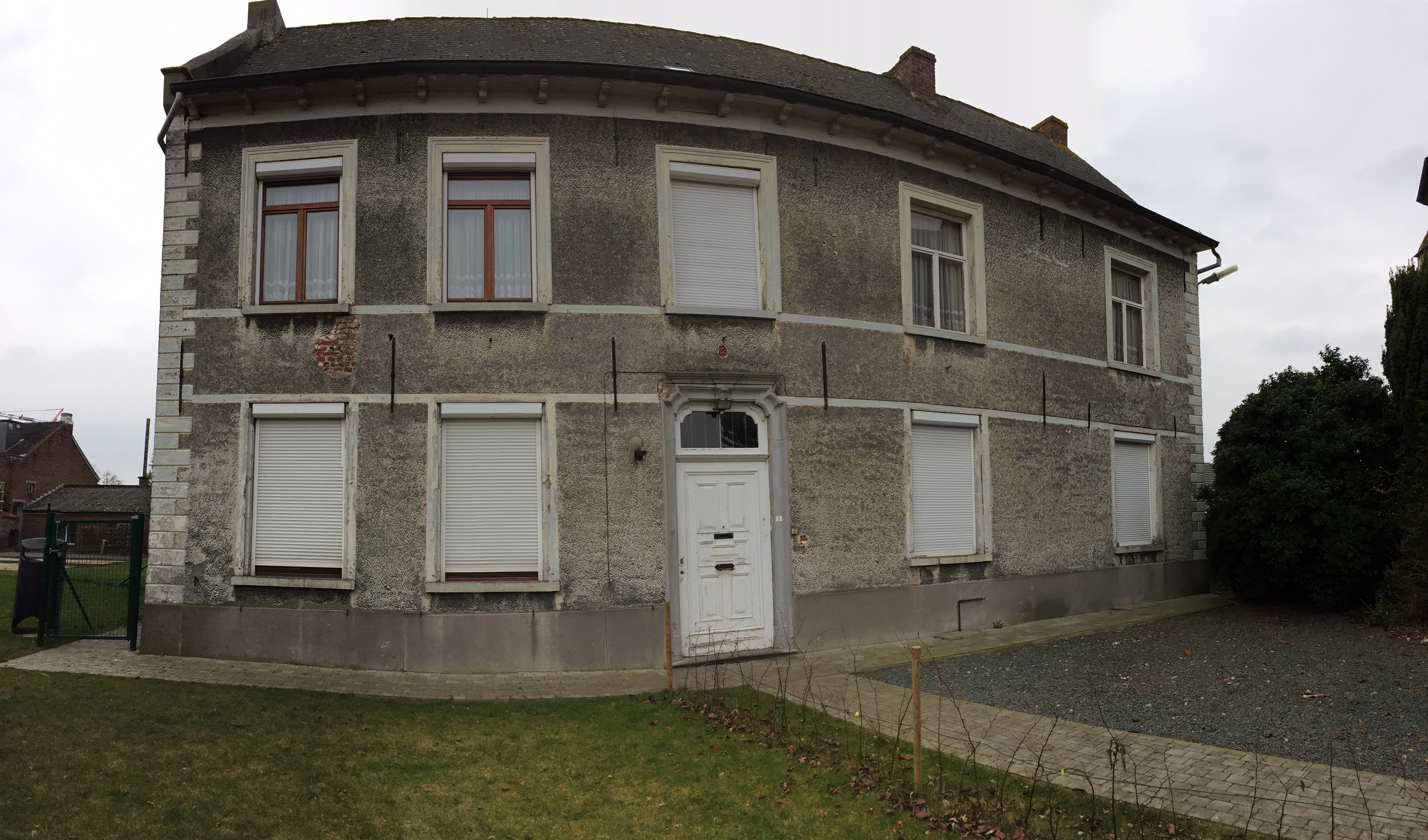 Pastorie - Cultureel erfgoed - Wambeek, Pol de Montstraat 5